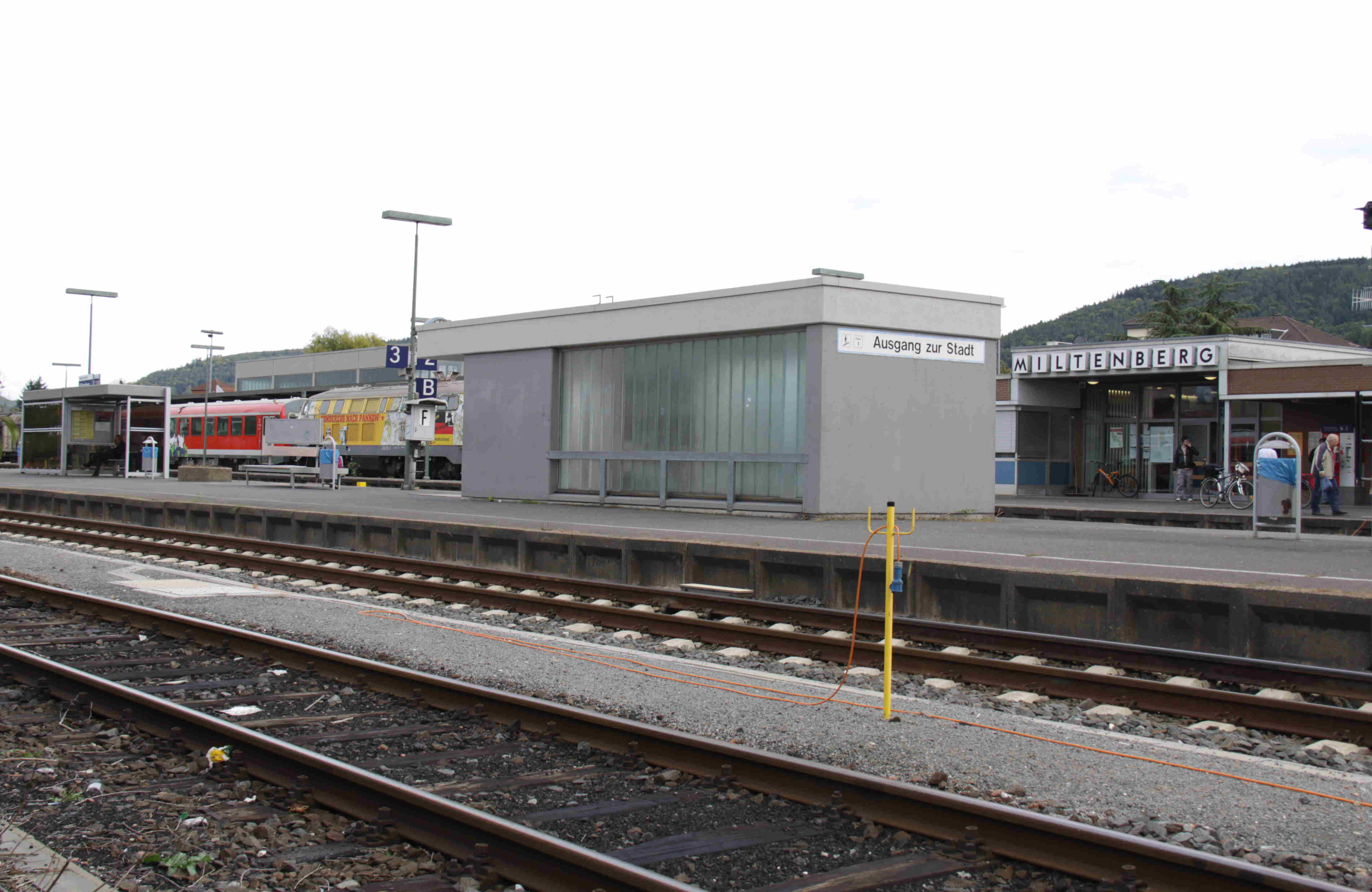 Bahnhof Miltenberg Bahnsteigseite